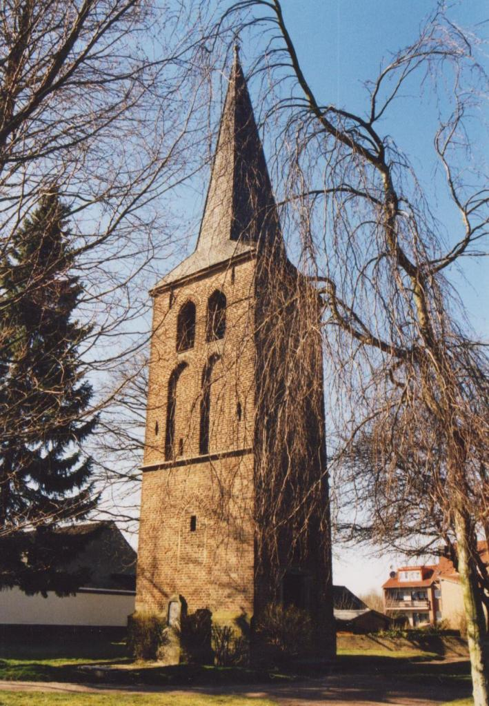 Römerturm Bergheim-Thorr This is a photograph of an architectural monument.